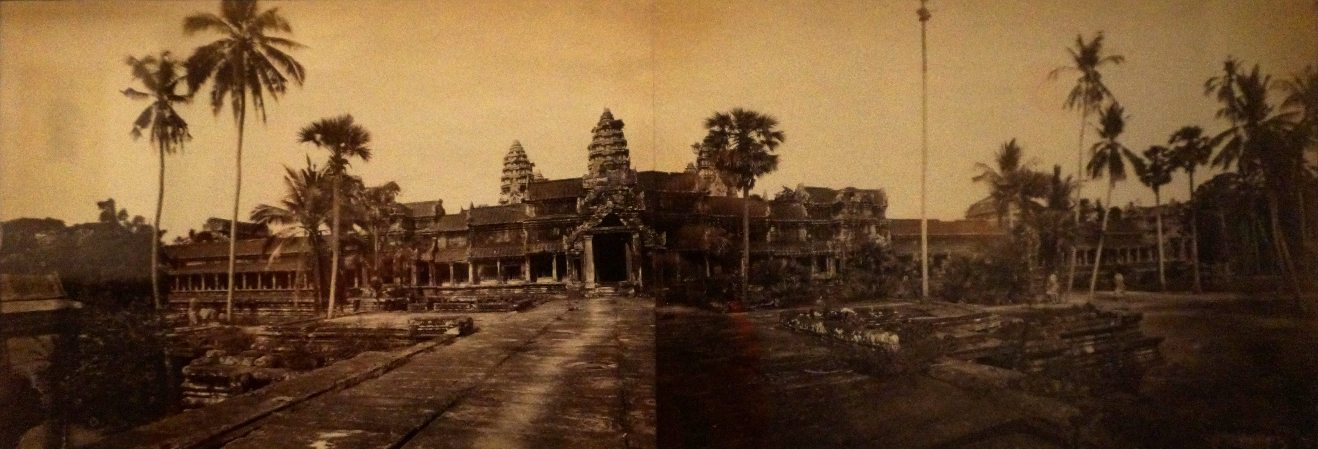 Présenté lors de l'exposition Indochine des territoires et des hommes 1856 1956. Photo sur albumine vers 1870.